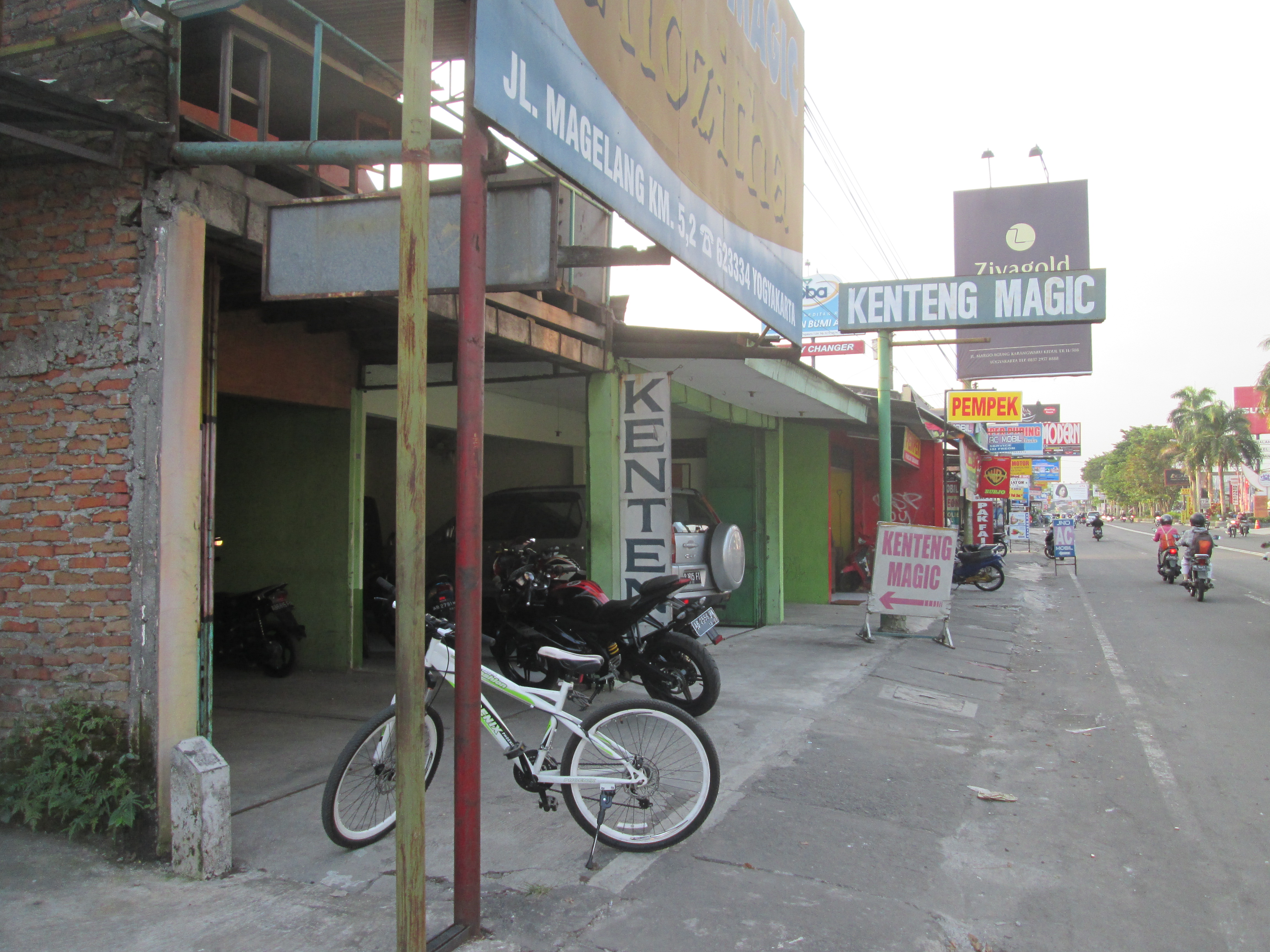 Bekas stasiun Kutu yang digunakan untuk bengkel kenteng magic.